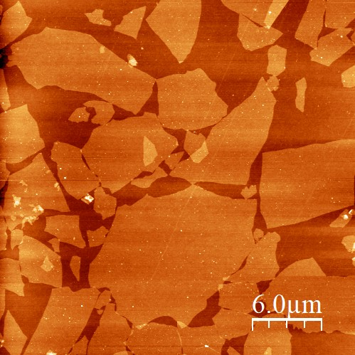 AFM-Aufnahme mehrerer Graphenoxid-Flocken auf 300 nm SiO2/Si Substrat.